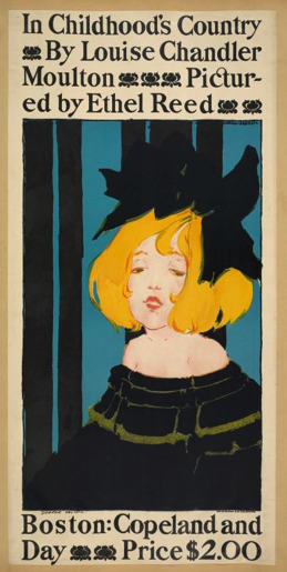 Lithographic poster for the book A Childhood's Country by Louise Chandler Moulton, pictured by Ethel Reed, printed in Boston for Copeland & Day.